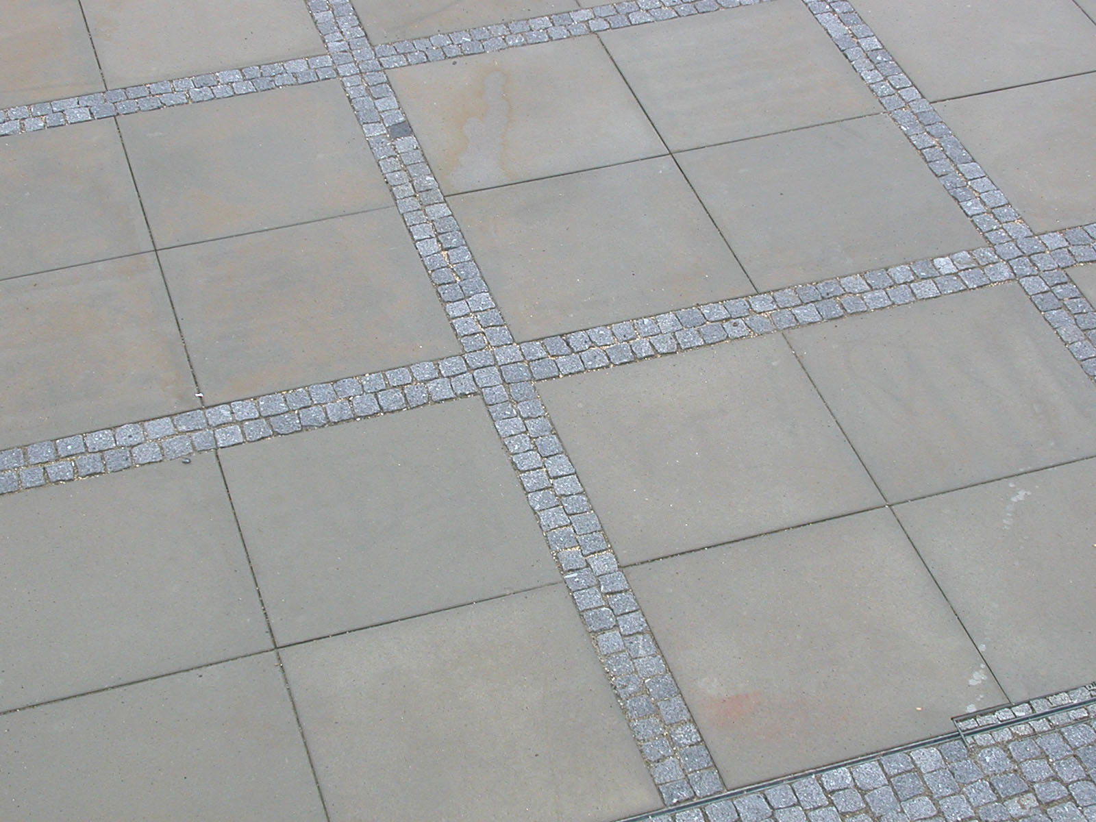 Großformate aus Beton, Format 100/100/10 in Kombination mit Natursteinbänderung